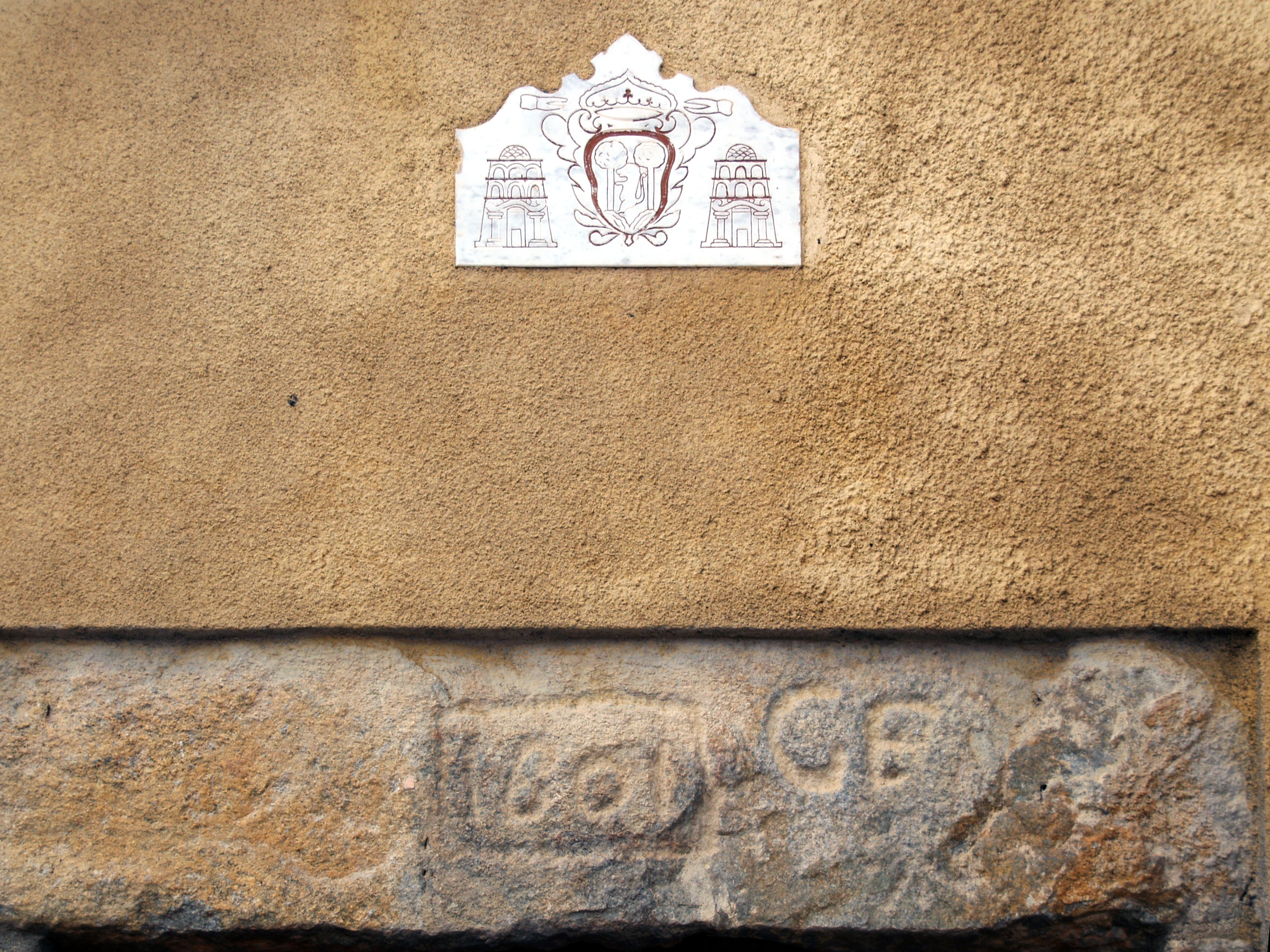 Costa, Balagne (Corse) - Linteau de porte d'une maison du village